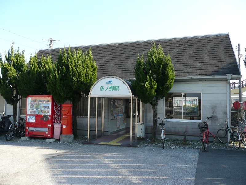 Onogo station